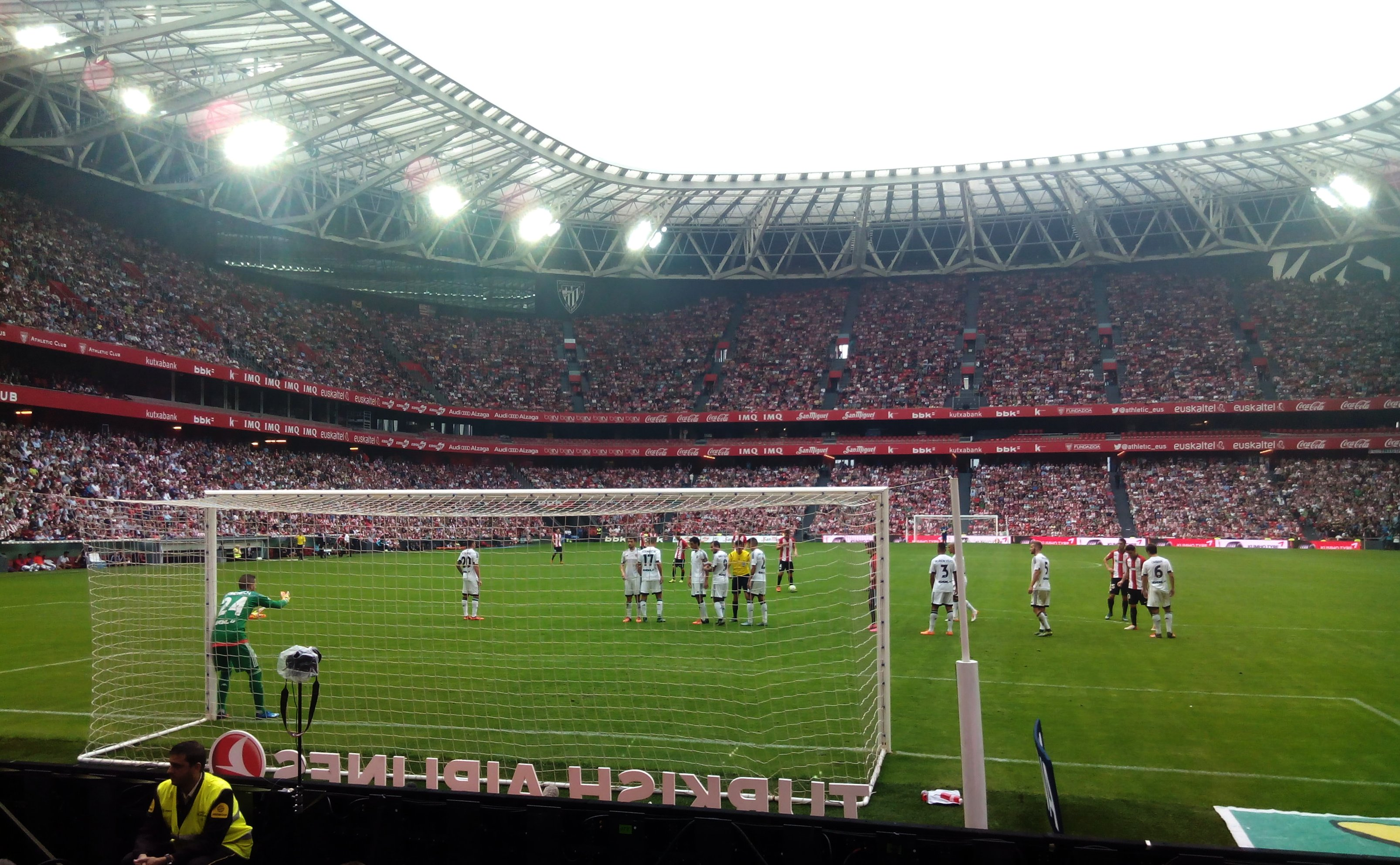 Barrera!